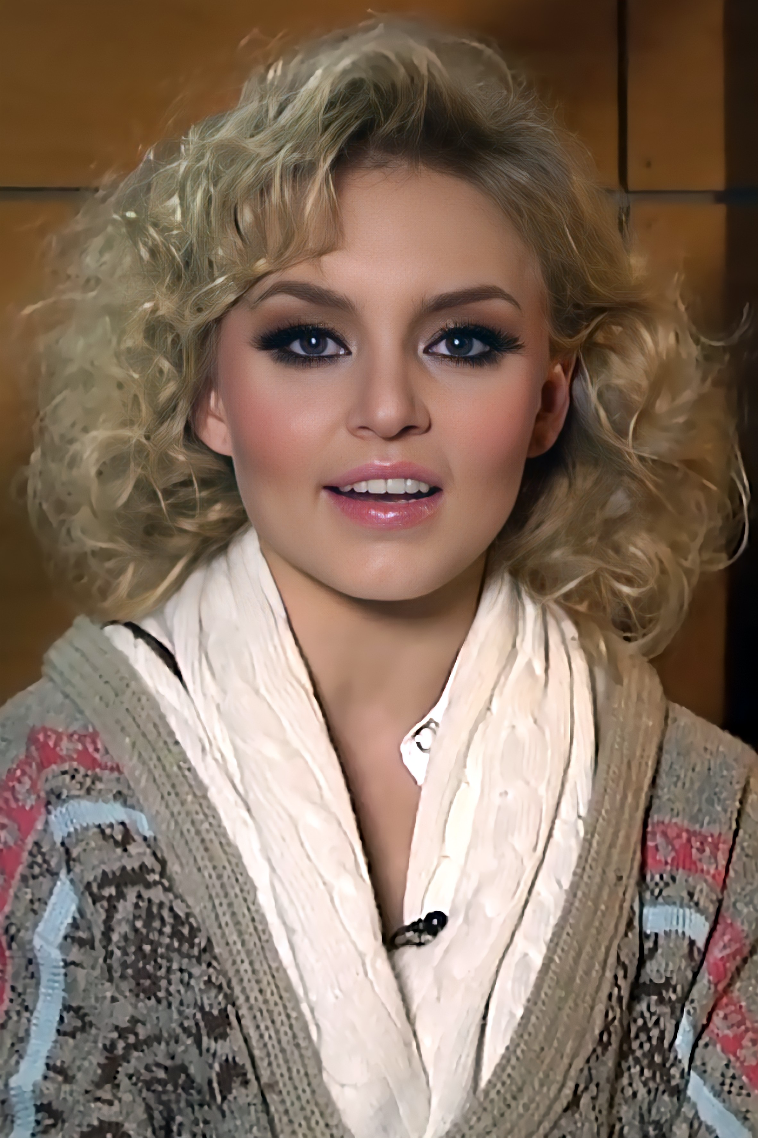 Angelique Boyer en sesión de fotos para Los 50 más bellos de la revista People en 2014